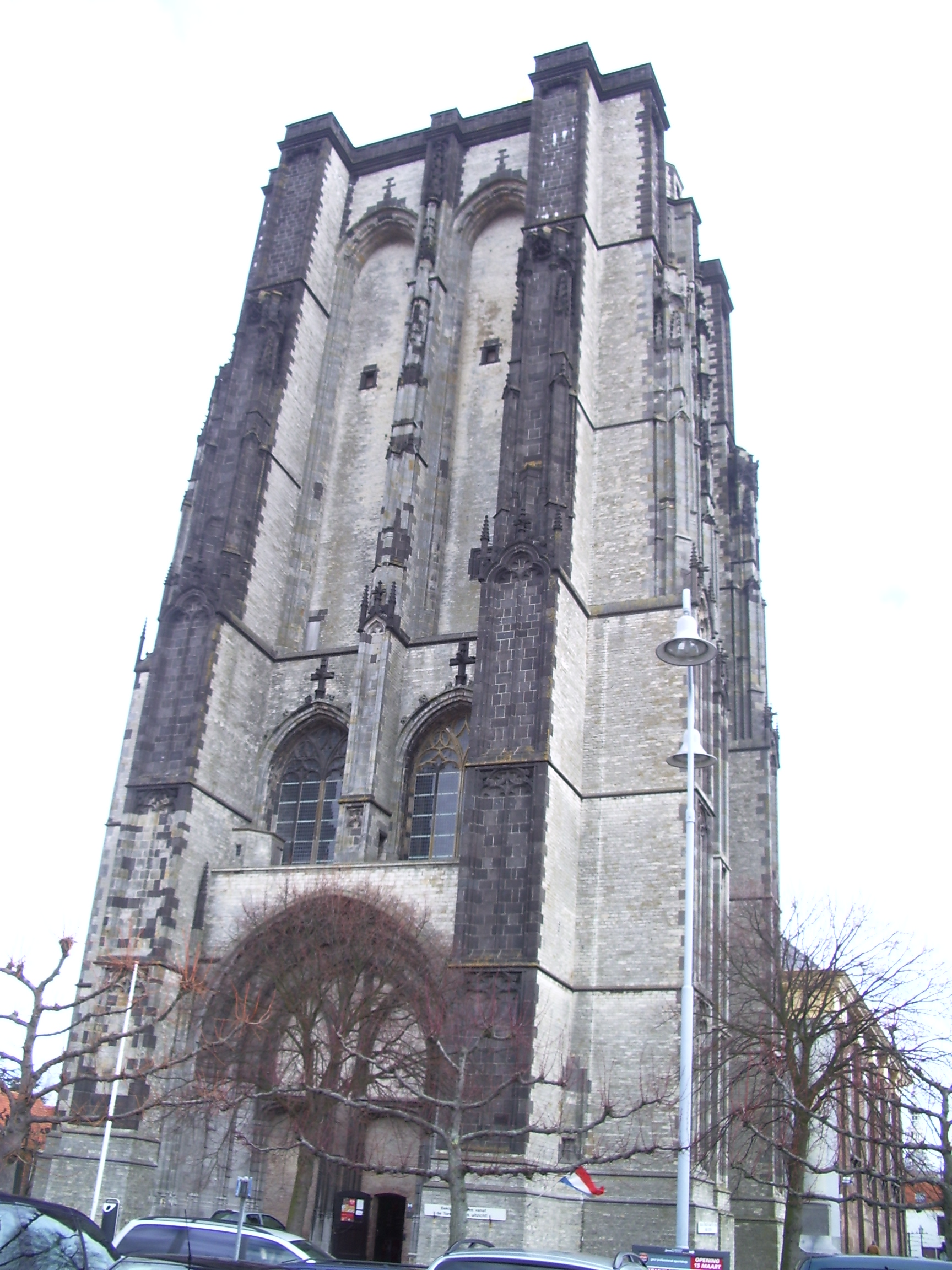 Turm der abgebrannte Kirche St. Lievens zu Zierikzee